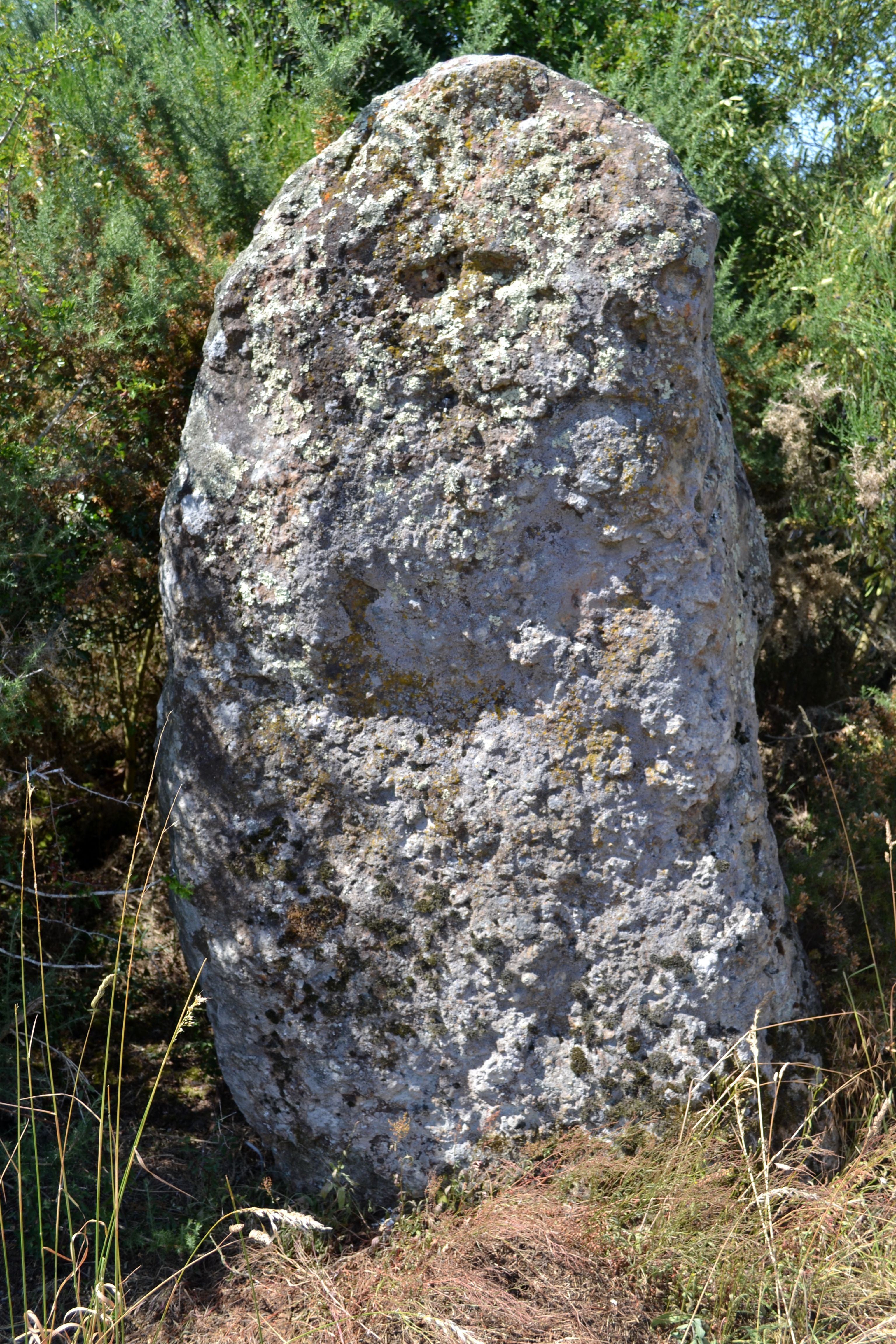 Les mégalithes du Moulin Violette sont deux menhirs déplacés et réutilisés sur le site des Etres à Petit Auverné par Edouard Deniaud, ancien curé de la paroisse.